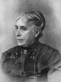 Caterina Pigorini Beri (1845-1924) scrittrice italiana